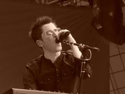 Gary Go ofreciendo un concierto en el estadio de Wembley el 5 de Julio del 2009.